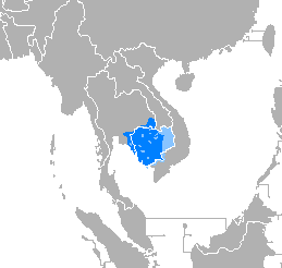 Donde es mayoritario Donde es minoritario